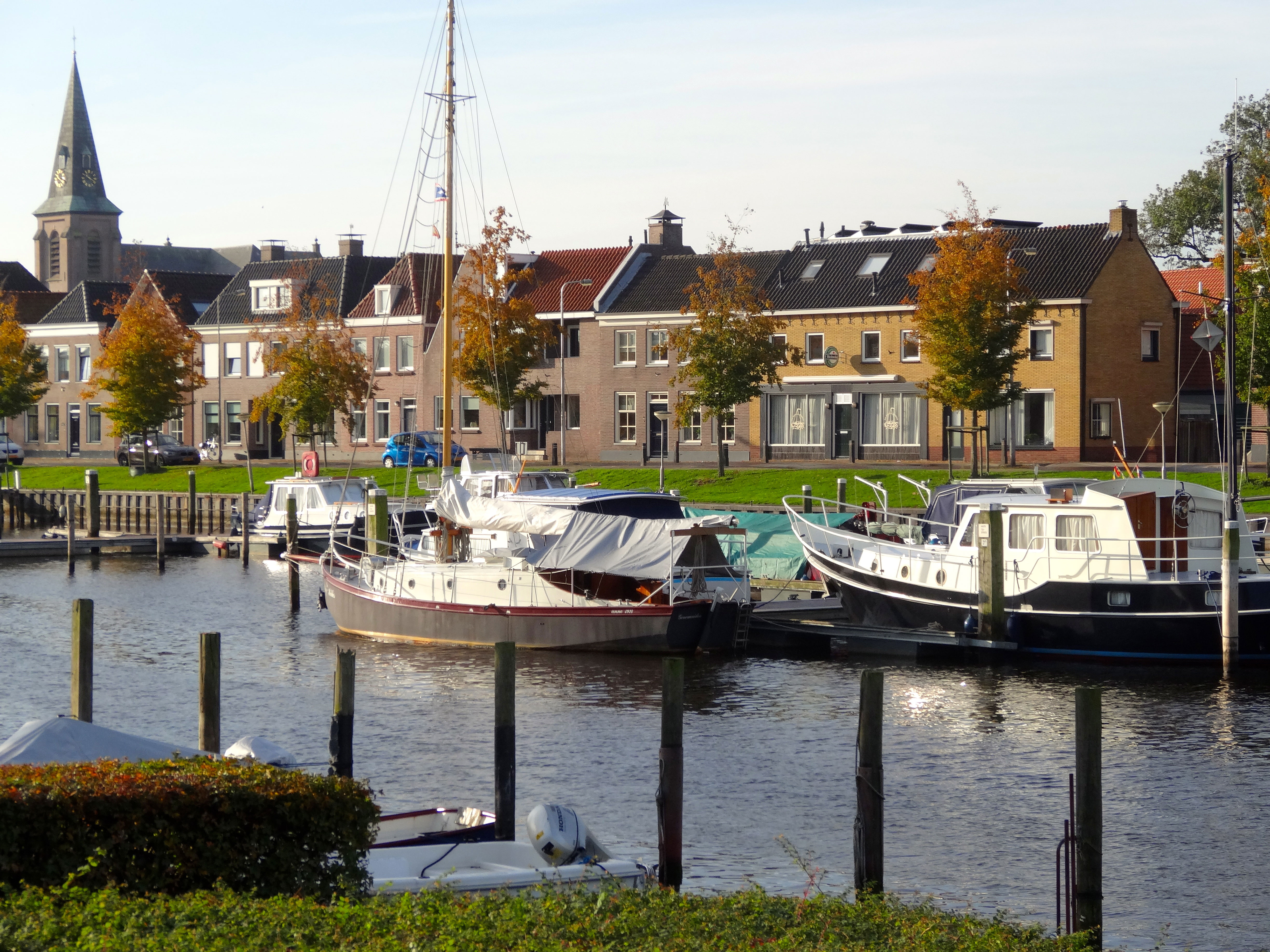 Binnenhaven Genemuiden met Grote of Nicolaaskerk